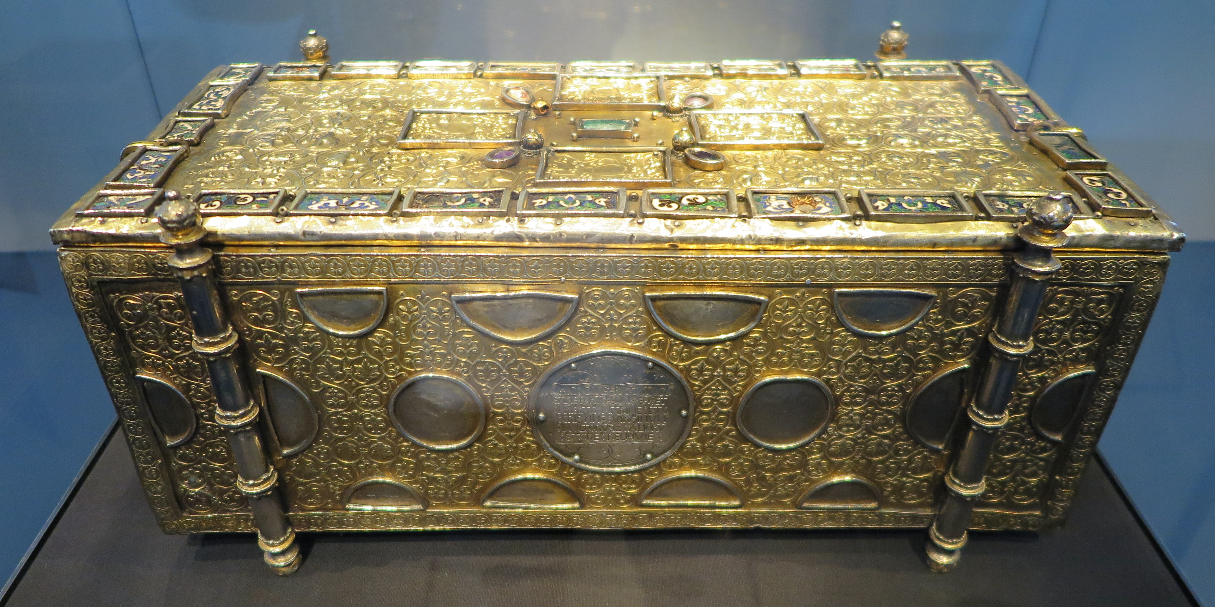 Reliquienschrein des heiligen Felix von Martana in der Aachener Domschatzkammer.